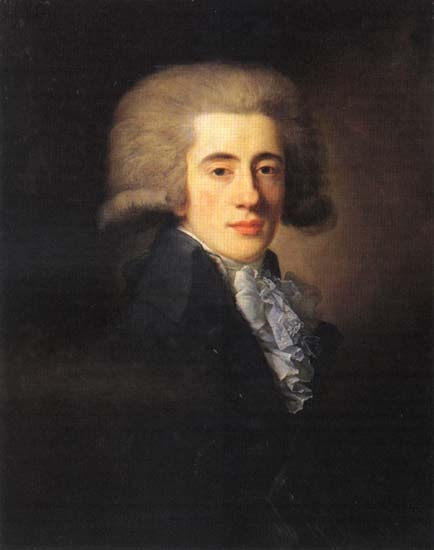 портрет Панина Никиты Петровича